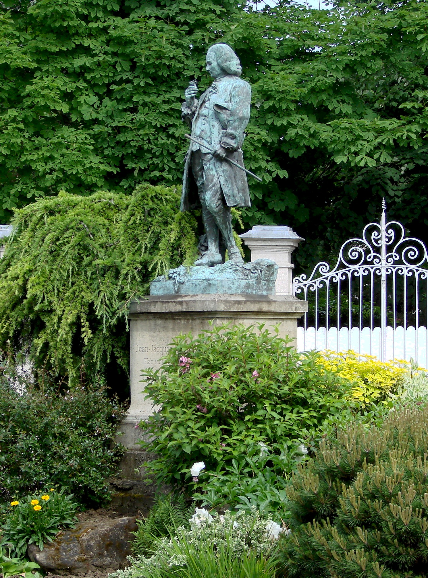 Monument for Jean-Jacques Rousseau in Montmorency, France